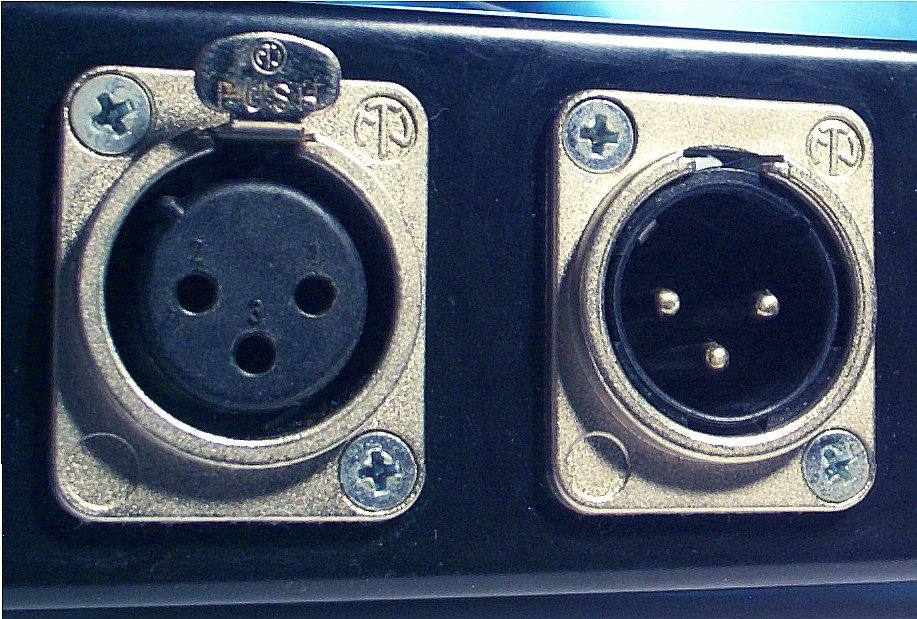 Female (left) and male (right) XLR panel connectors